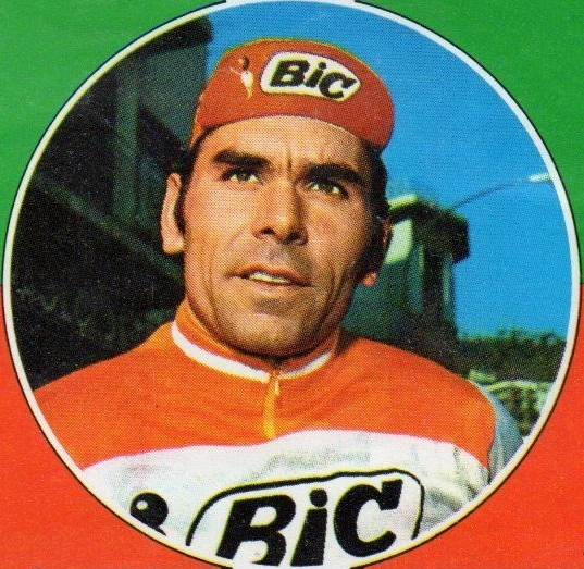 SPRINT '73-PANINI-Figurina n.326- AGOSTINHO - PORTOGALLO -Recuperata